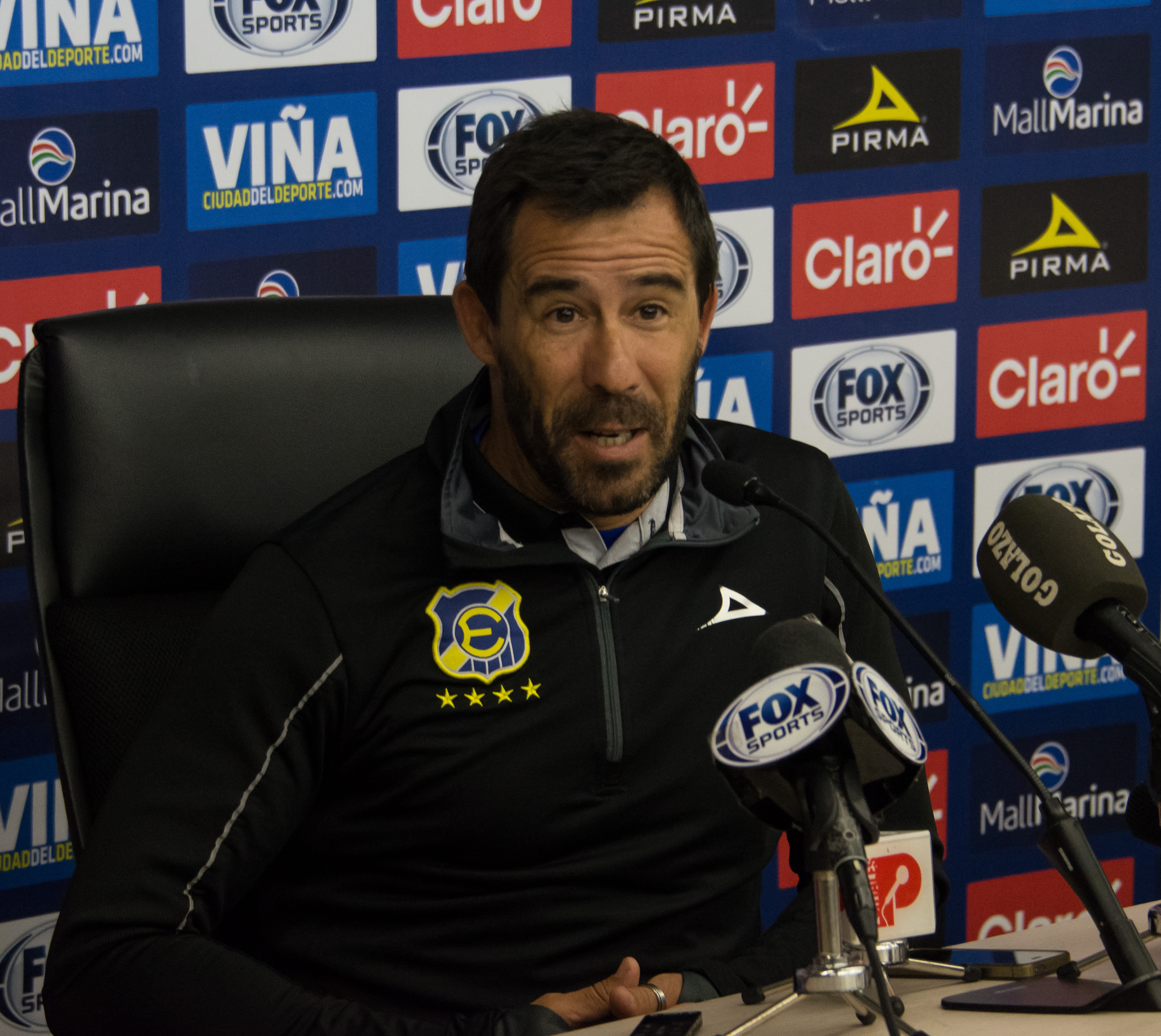 Everton v Unión Española, Estadio Sausalito, Viña del Mar, Chile.